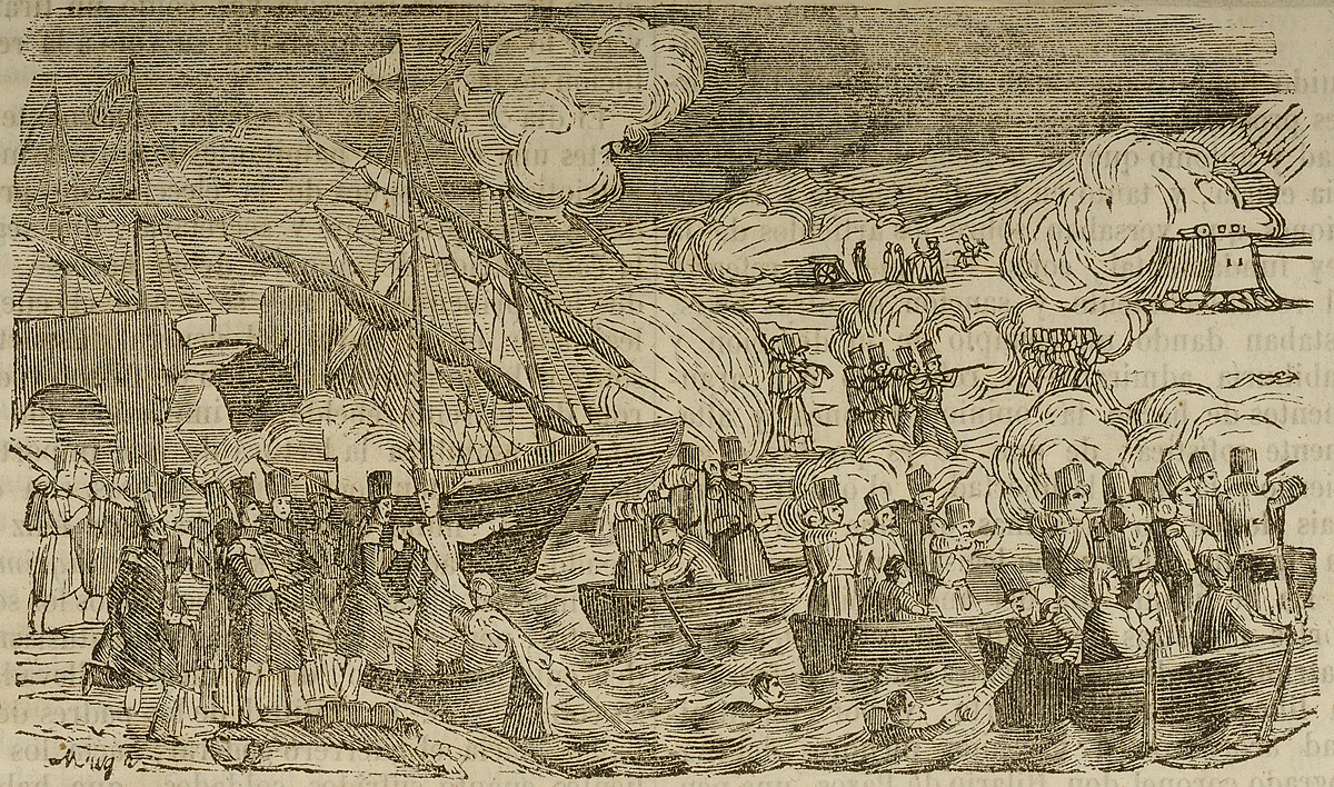 Baldomero Esparteroren tropak Lutxanako zubiaren aurka egindako erasoa Lehenengo Guda Karlistan, armada britainiarra eta espainiarra lagun zituela. (1836ko abenduraren 24) Irudia, xilografia modura erakutsia Panorama Españolen, 1849an